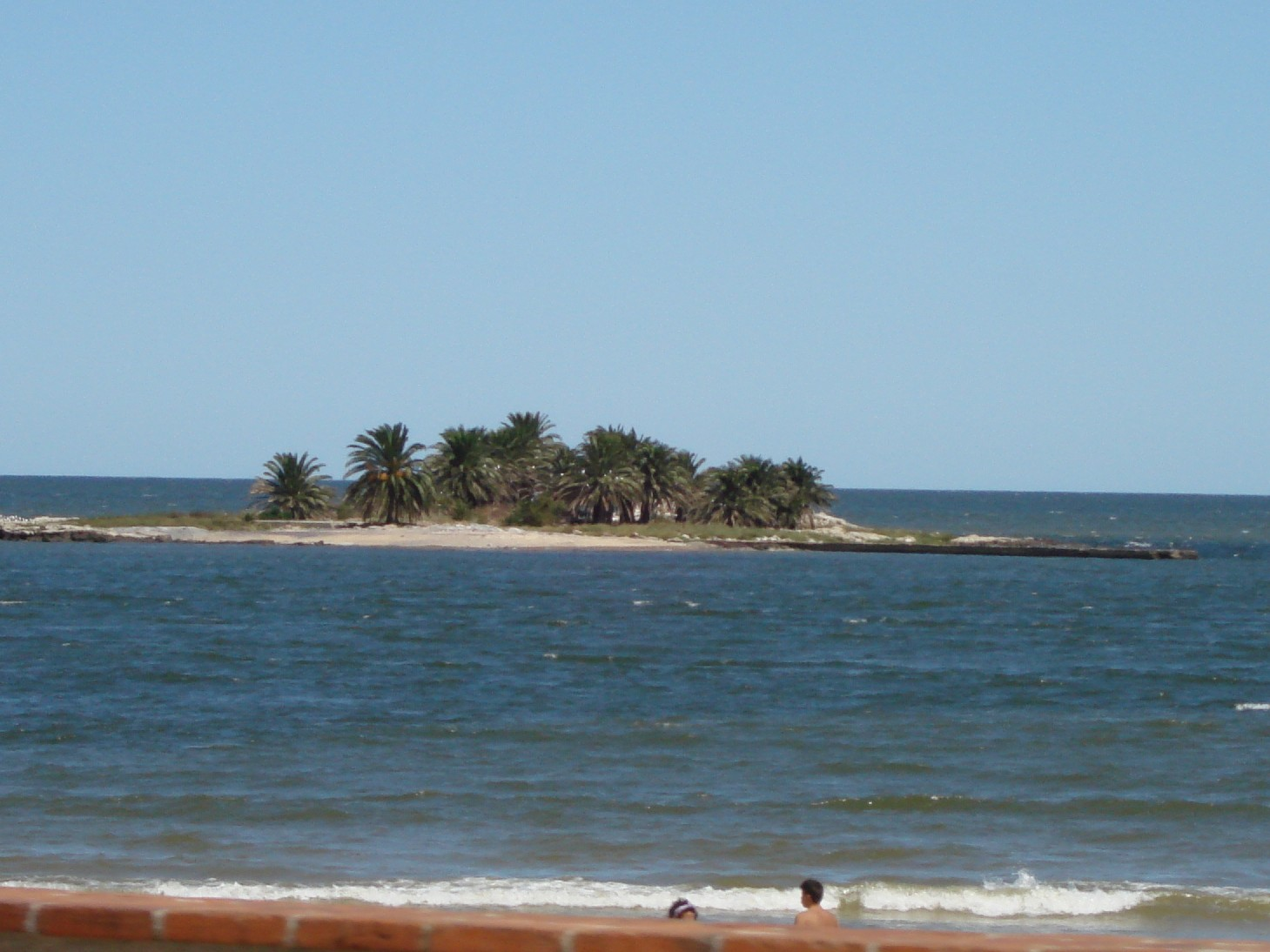 Isla de las Gaviotas